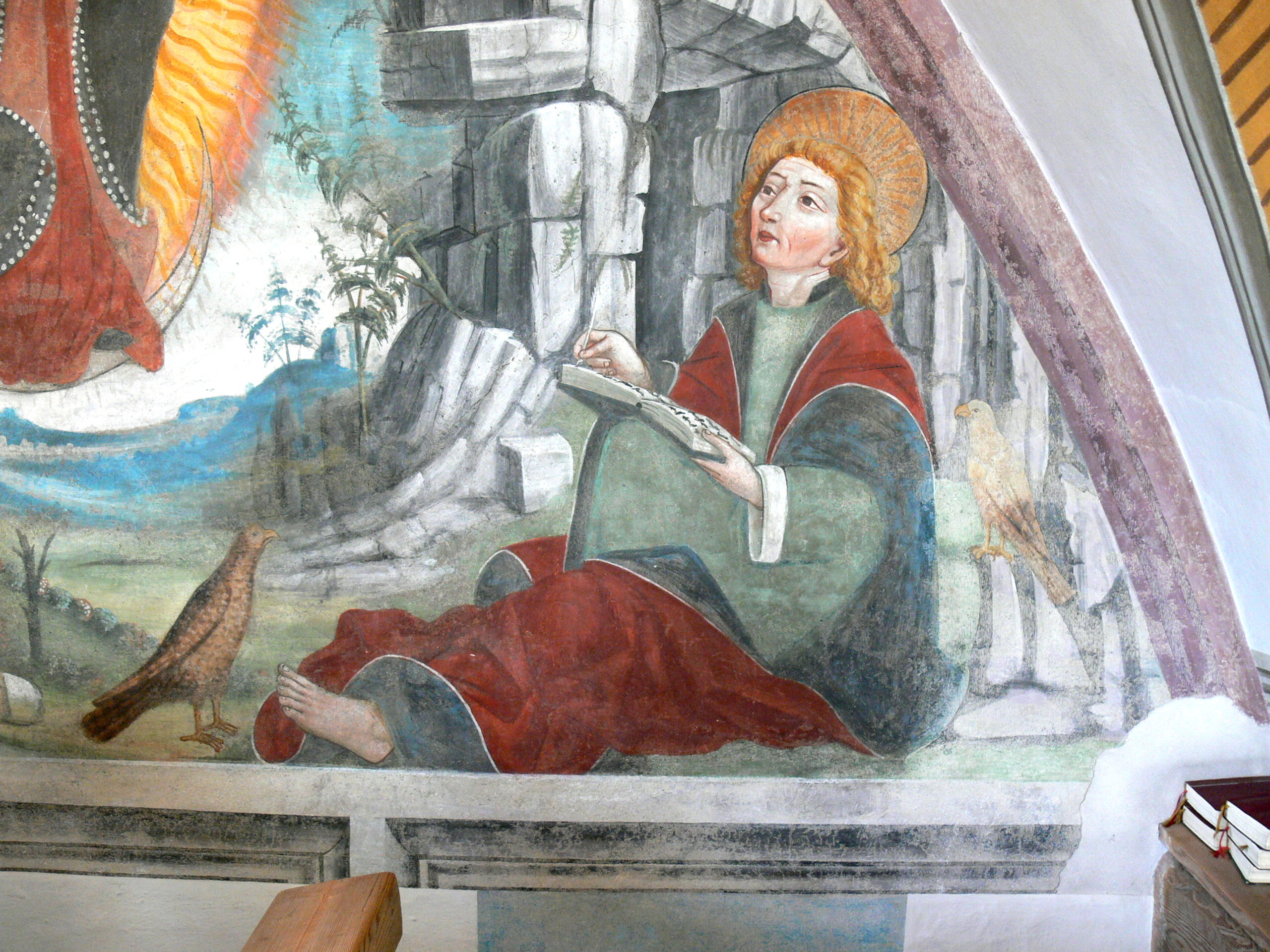 Evangelist Johannes auf Patmos